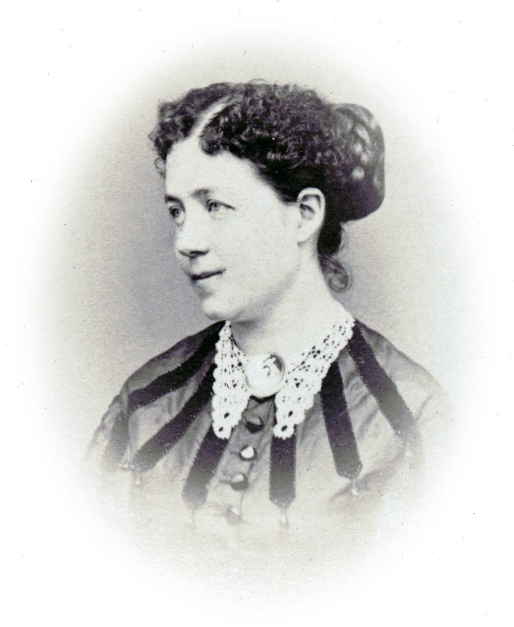 Charlotte Lindahl, skådespelare vid Mindre teatern 1882